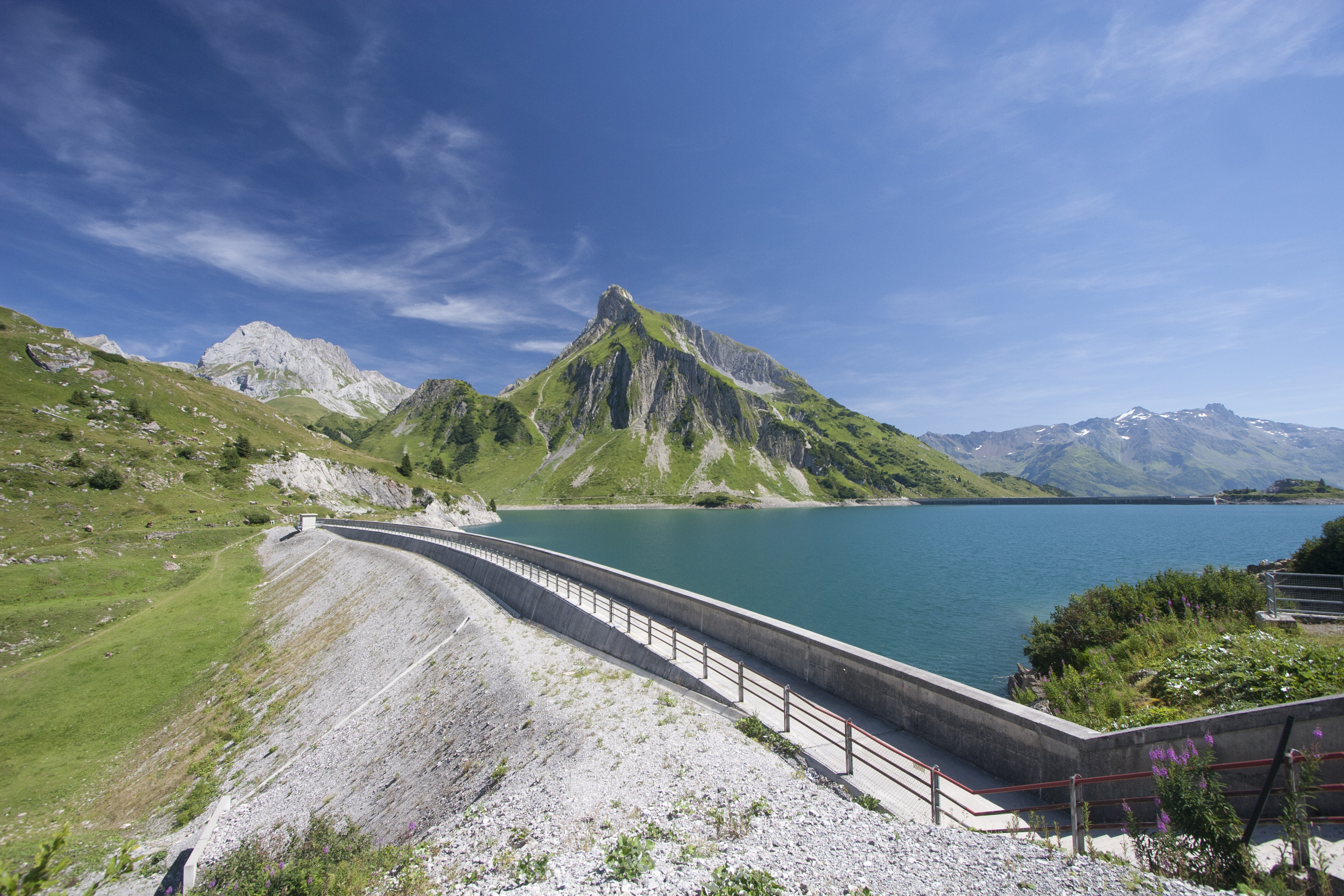 Spullersee in august 2013